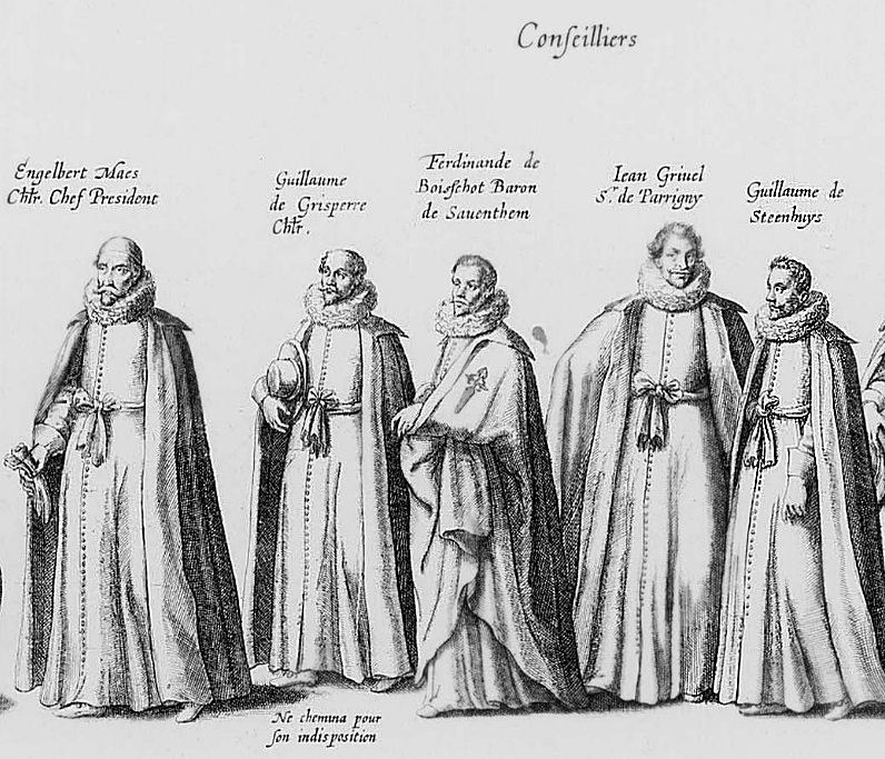 Pompes funèbres de l'archiduc Albert d'Autriche à Bruxelles / Série de 65 gravures d'un recueil relatant les funérailles d'Albert d'Autriche à Bruxelles le 11 mars 1622.